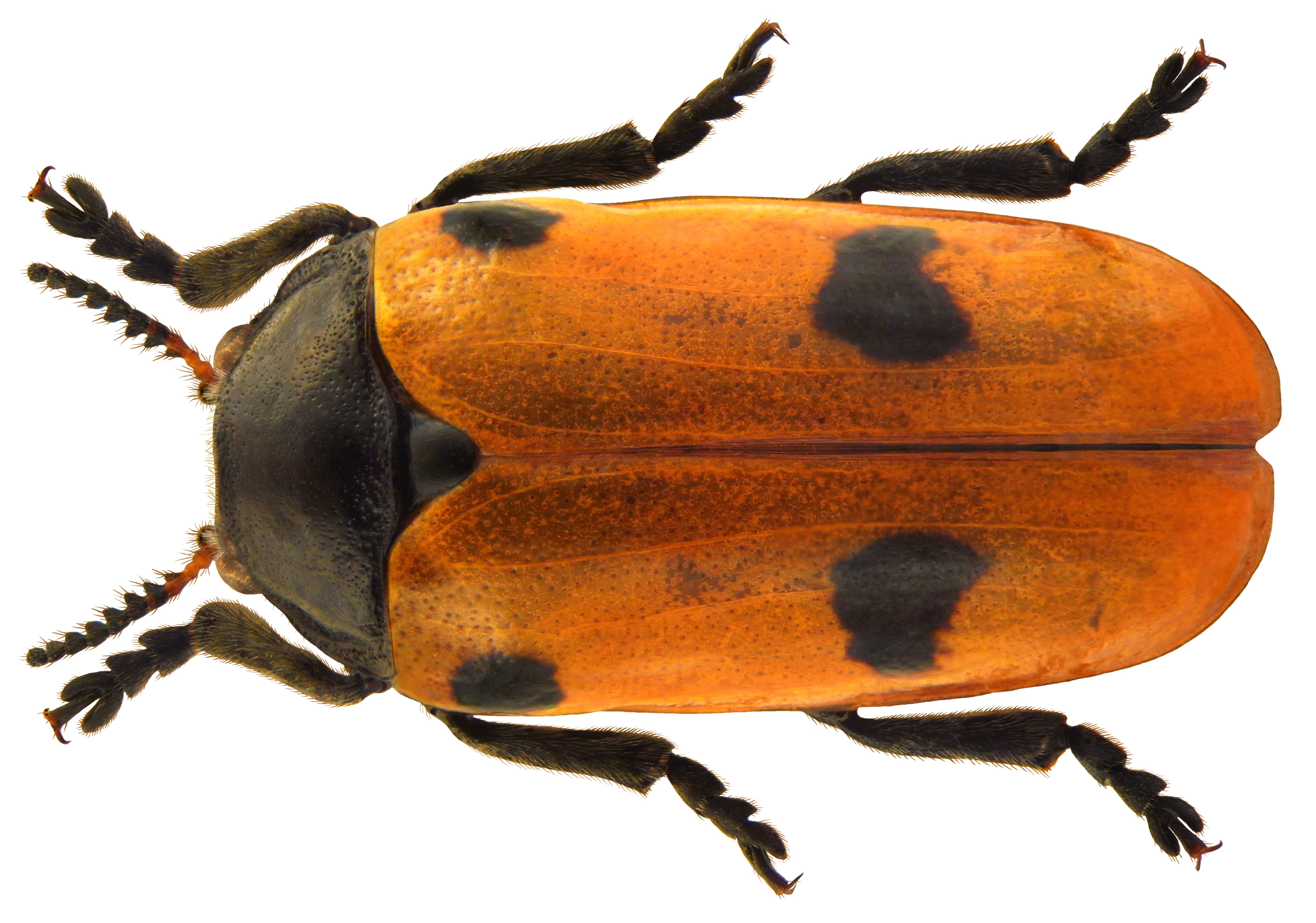 Clytra quadripunctata Lacord, 1848 Familie: Chrysomelidae Groesse: 7-11 mm Ökologie: Entwicklung bei Ameisen Fundort: Germania, Bayern, Oberfranken, Kulmbach leg.det. U.Schmidt, 1972 Photo: U.Schmidt, 2005